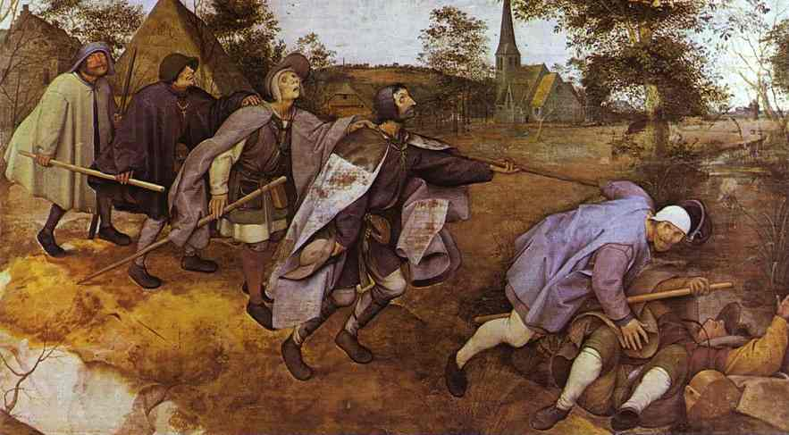 De Parabel van de Blinden, door Pieter Breughel de Oudere